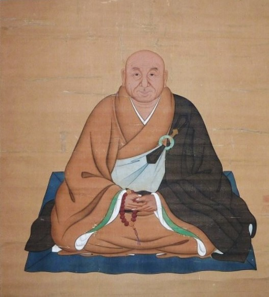 近藤貞用の肖像。